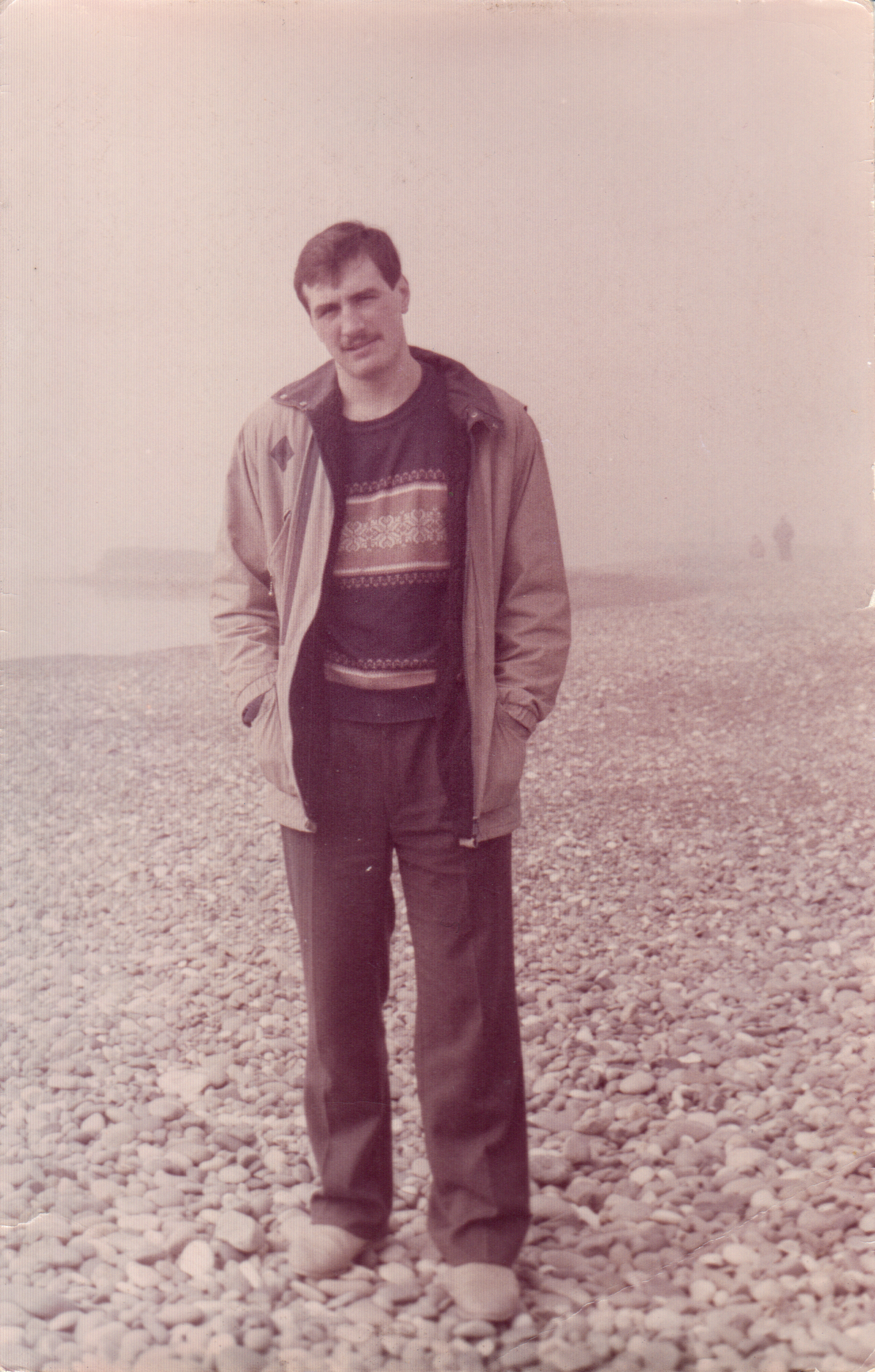 Николай Кульпин (?). На море